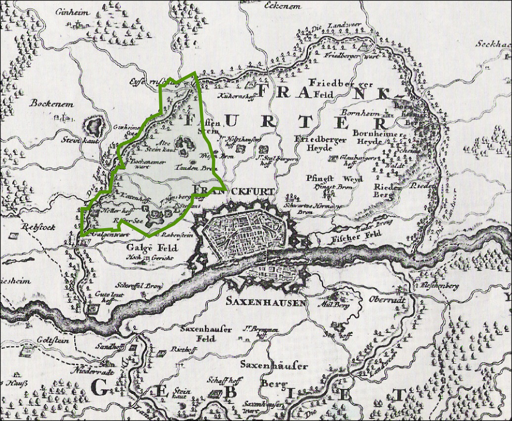 Westend innerhalb der Frankfurter Gemarkung (schematisch)